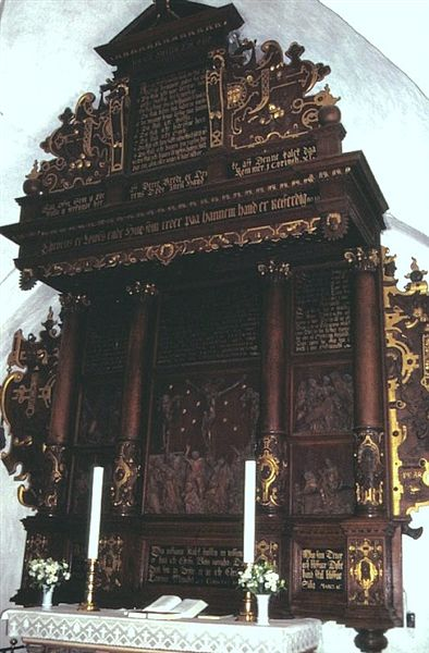 Kirke Stillinge Kirke i Danmark. Altertavle